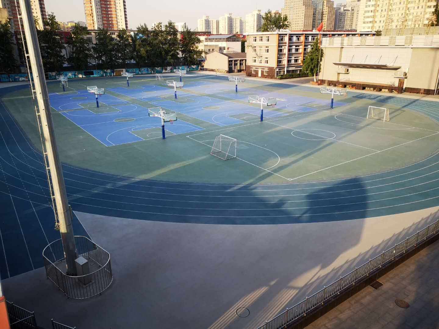 中文（中国大陆）: 中关村中学操场